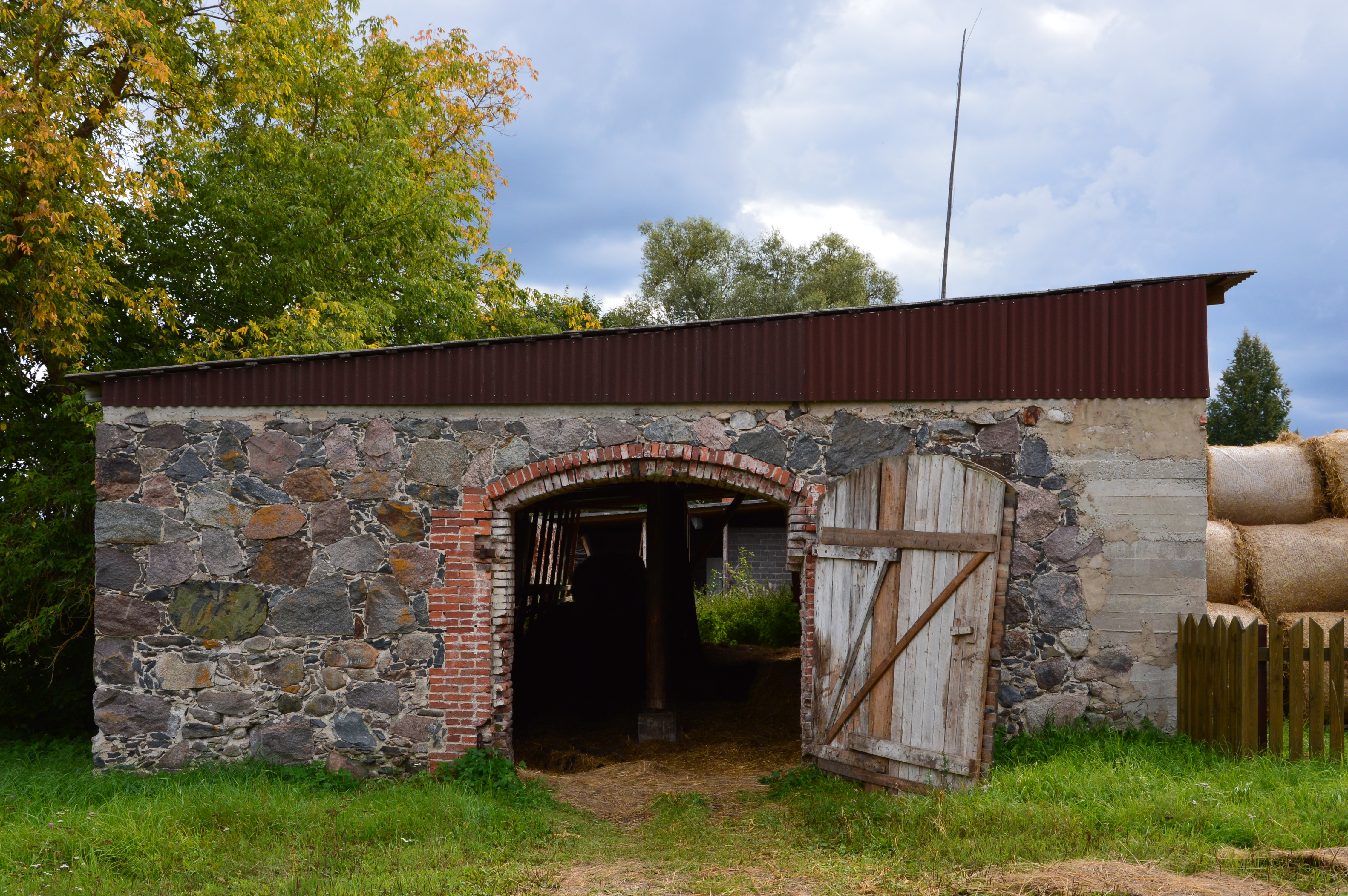 Sänna mõisa laut